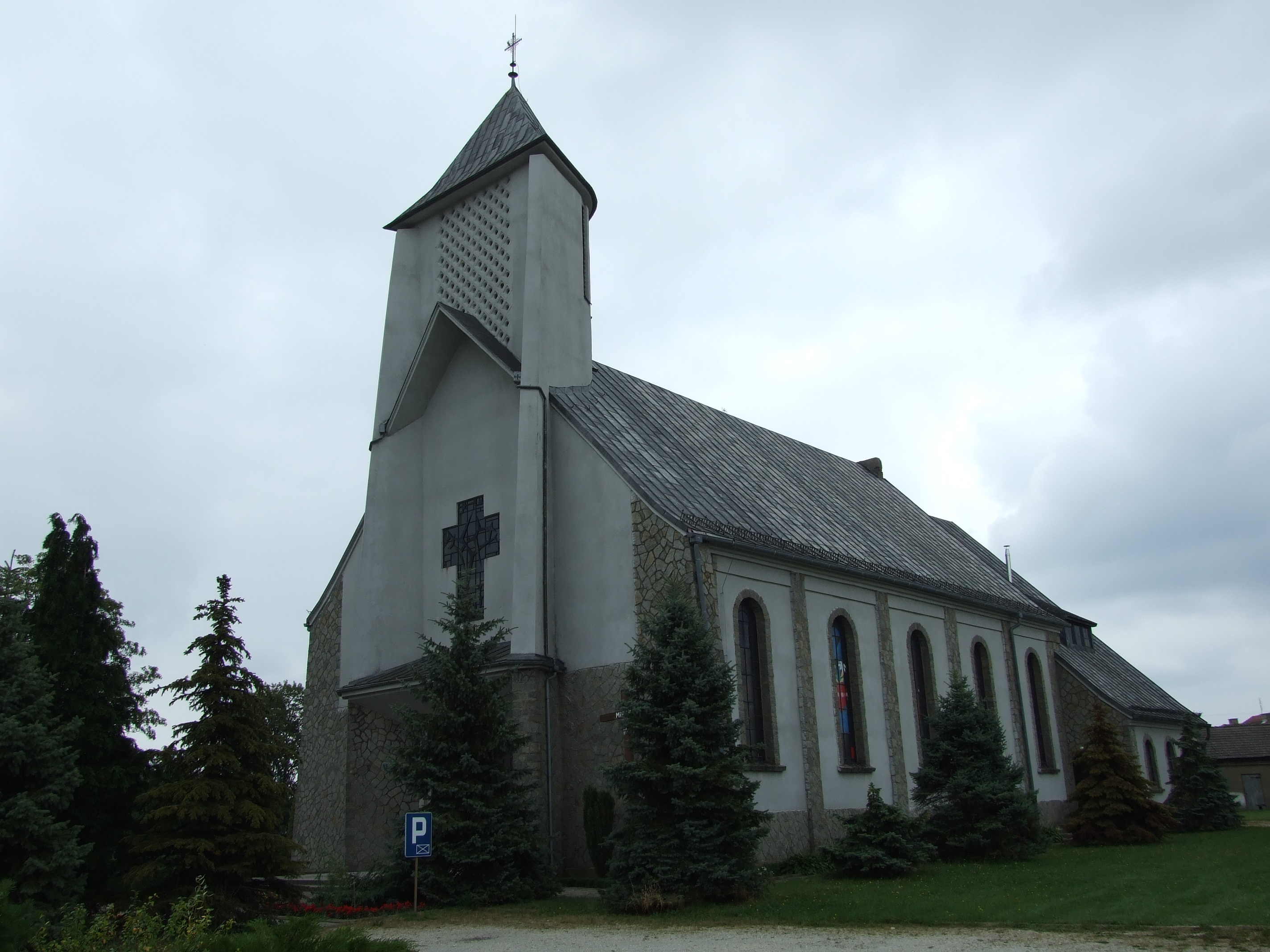 Kościół parafialny w Sowczycach